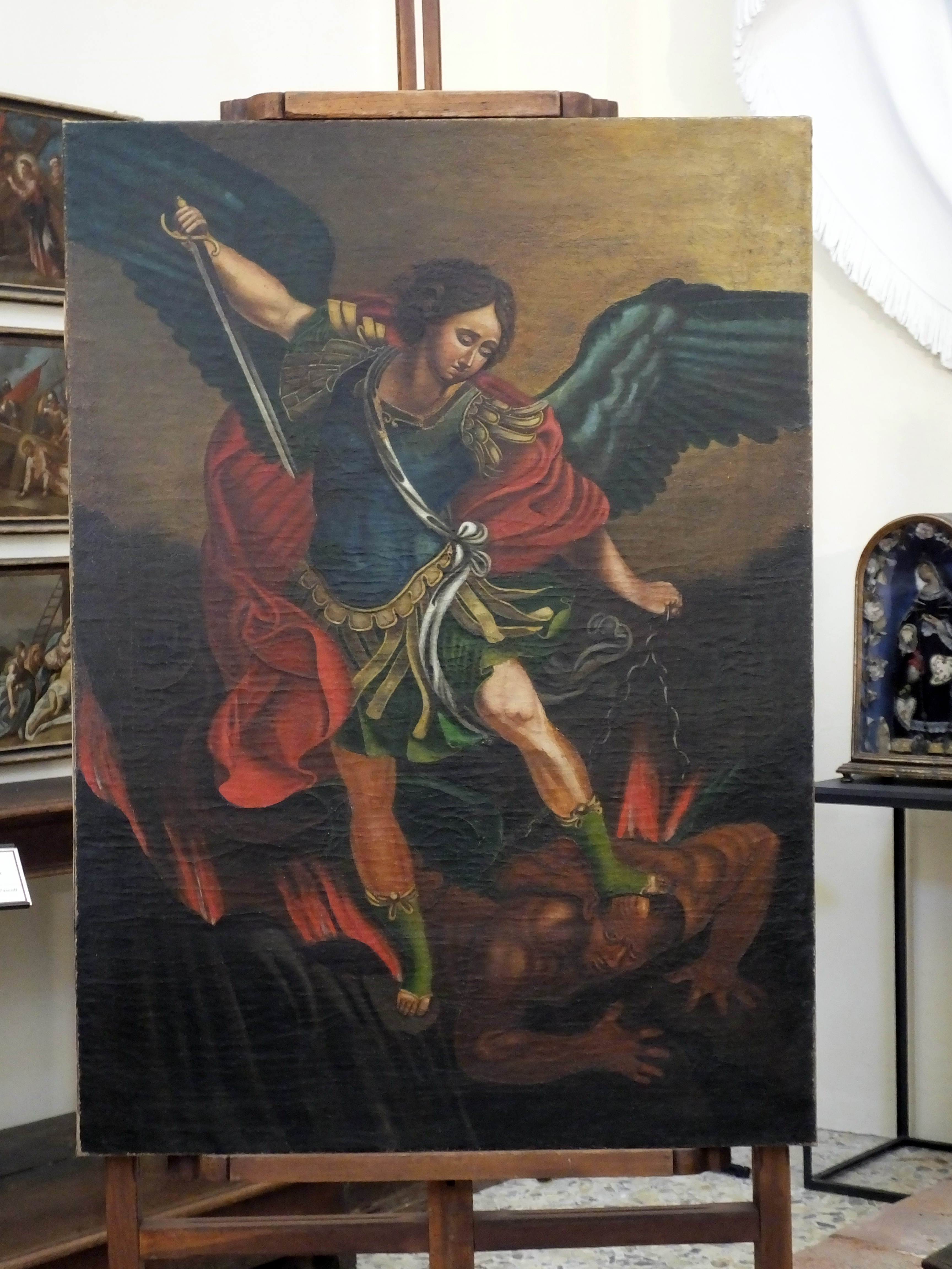 Ex Chiesa della Madonna di Loreto This is a photo of a monument which is part of cultural heritage of Italy.